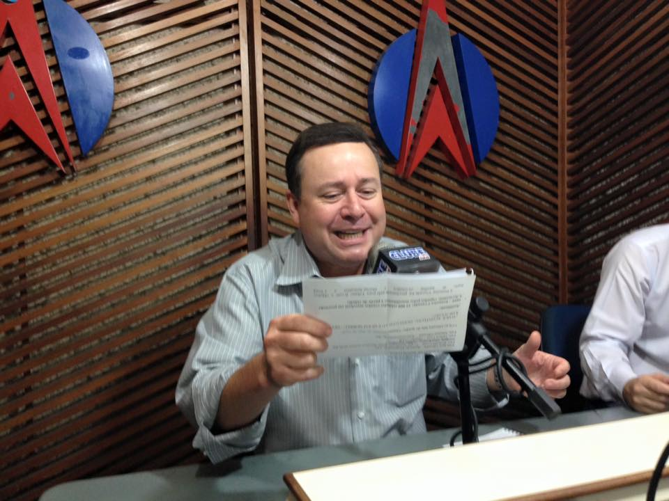 Há 30 anos à frente do Programa do Léo na CLUBE-AM